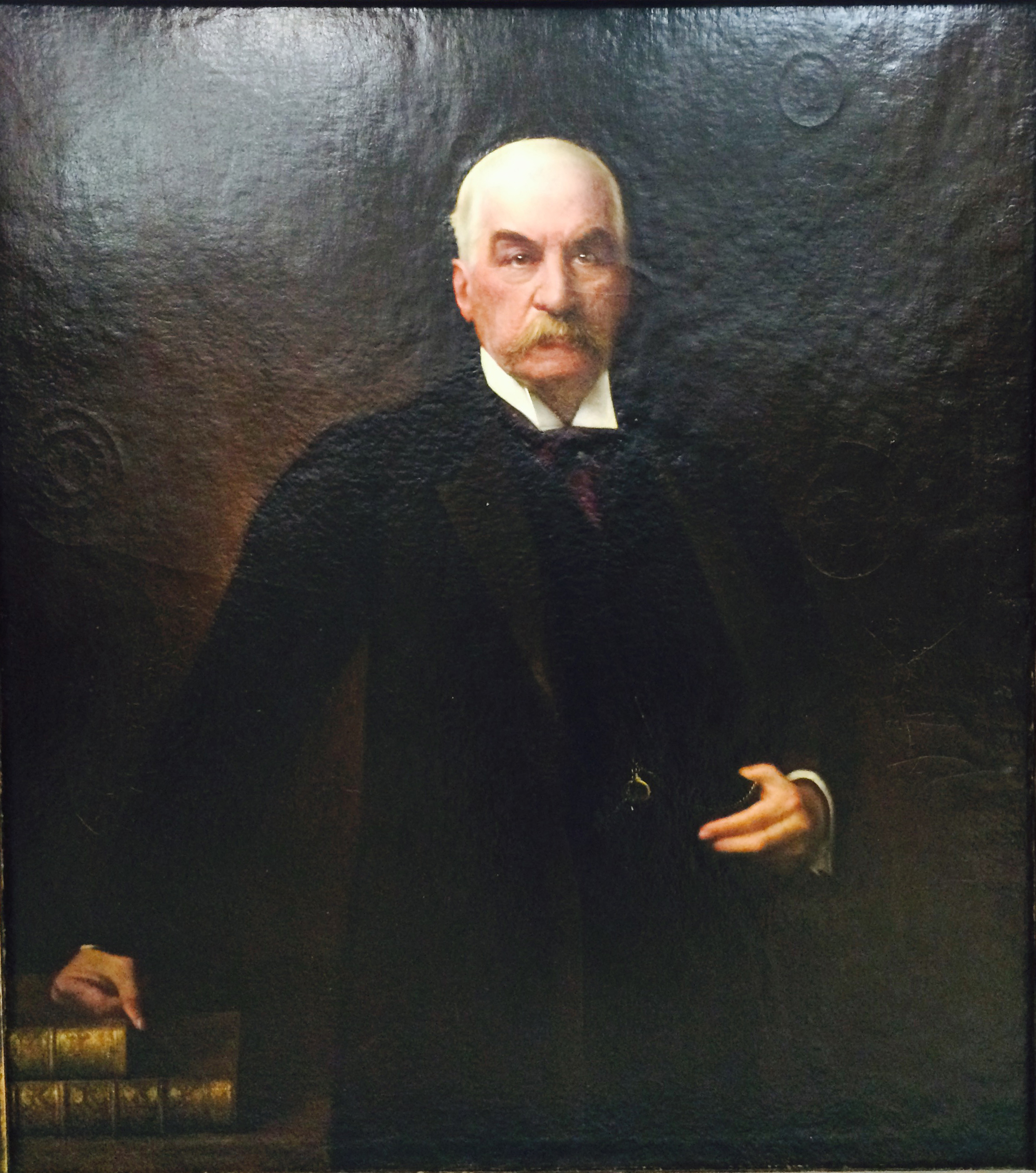 Painting; Paintings